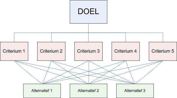 AHP keuzestructuur in VISIO